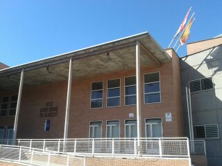 Colegio Publico